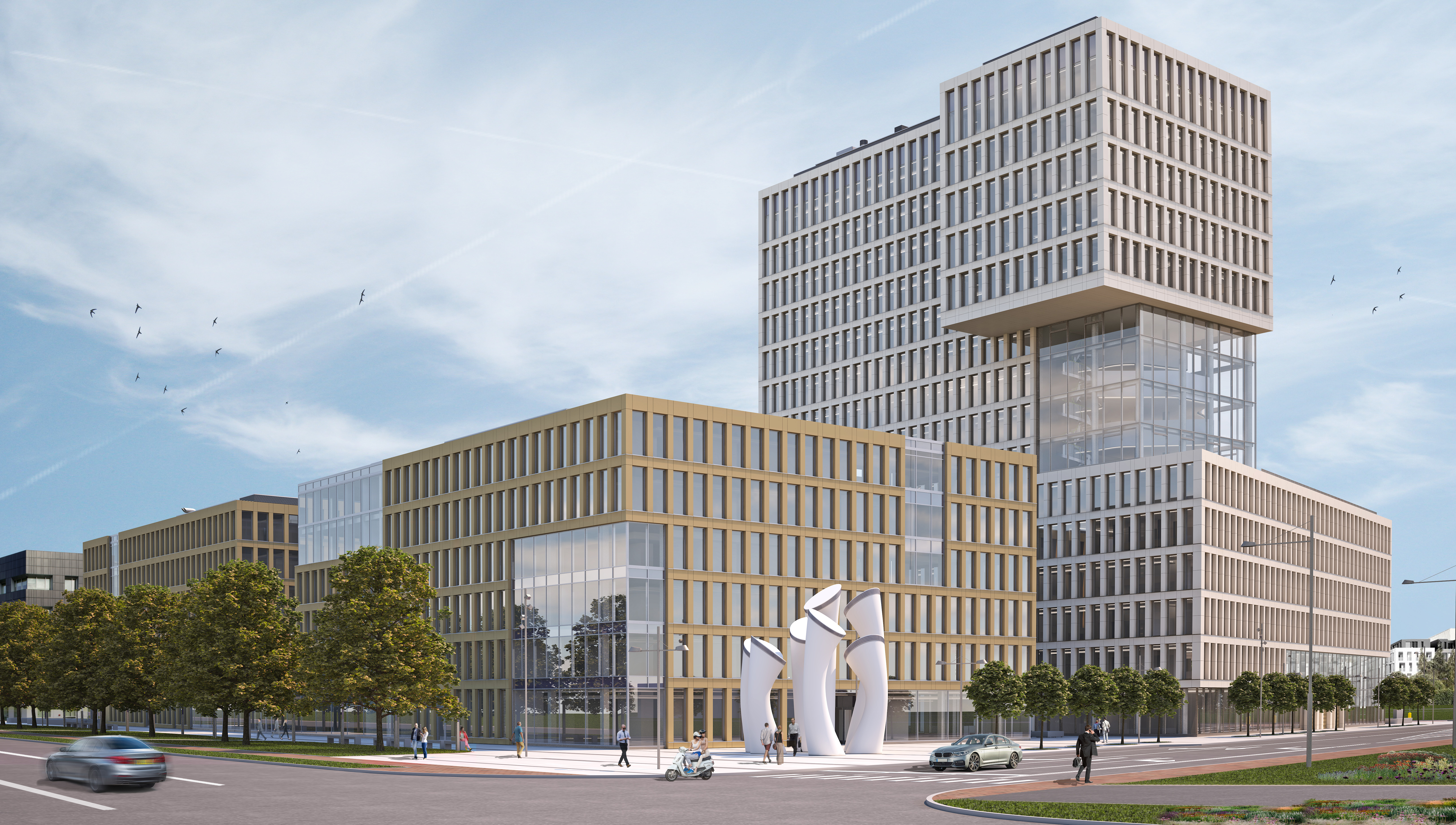 New Hanza biroju kvartāla projekts